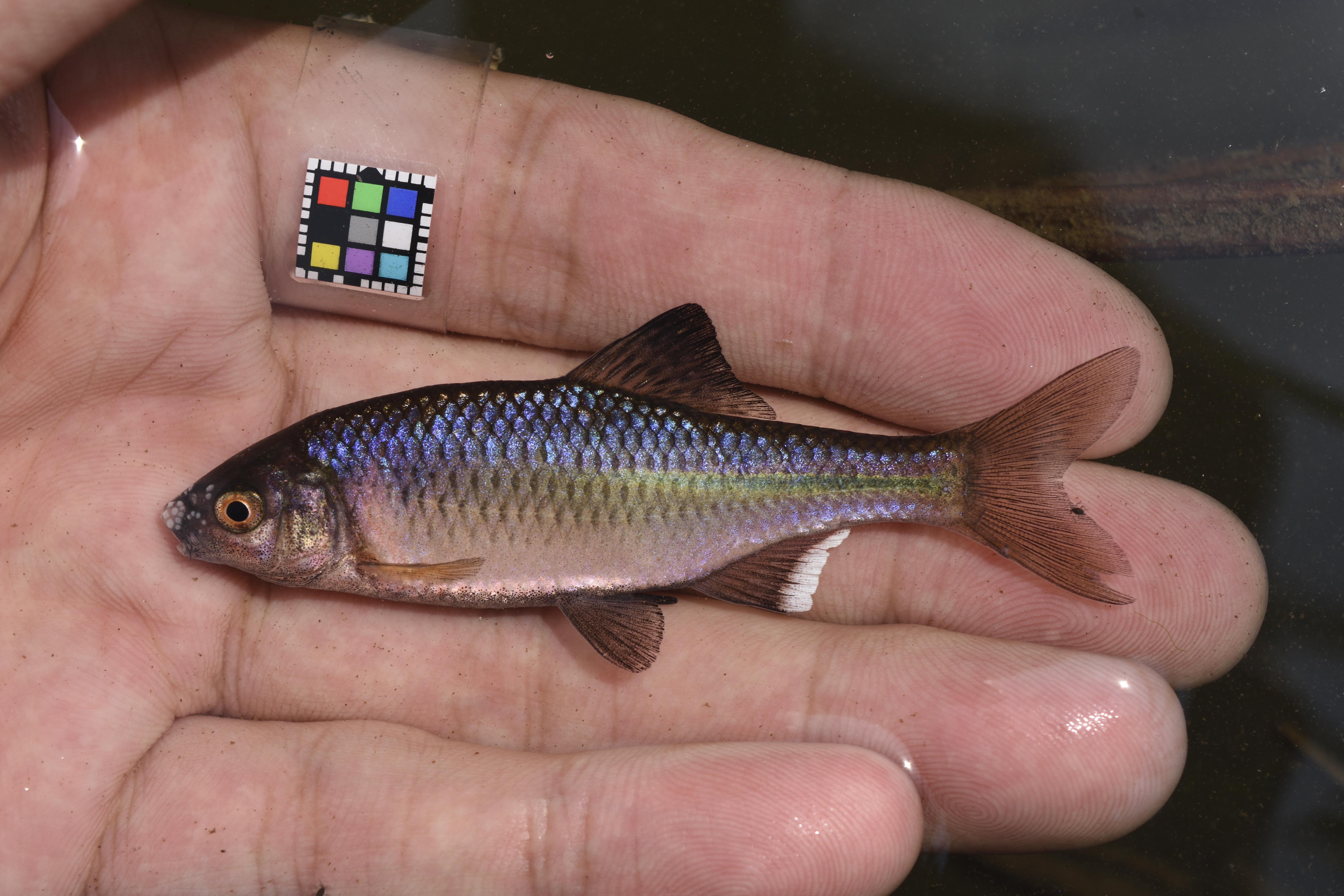 初夏の繁殖期、婚姻色を呈するタナゴのオス。福島県。詳細